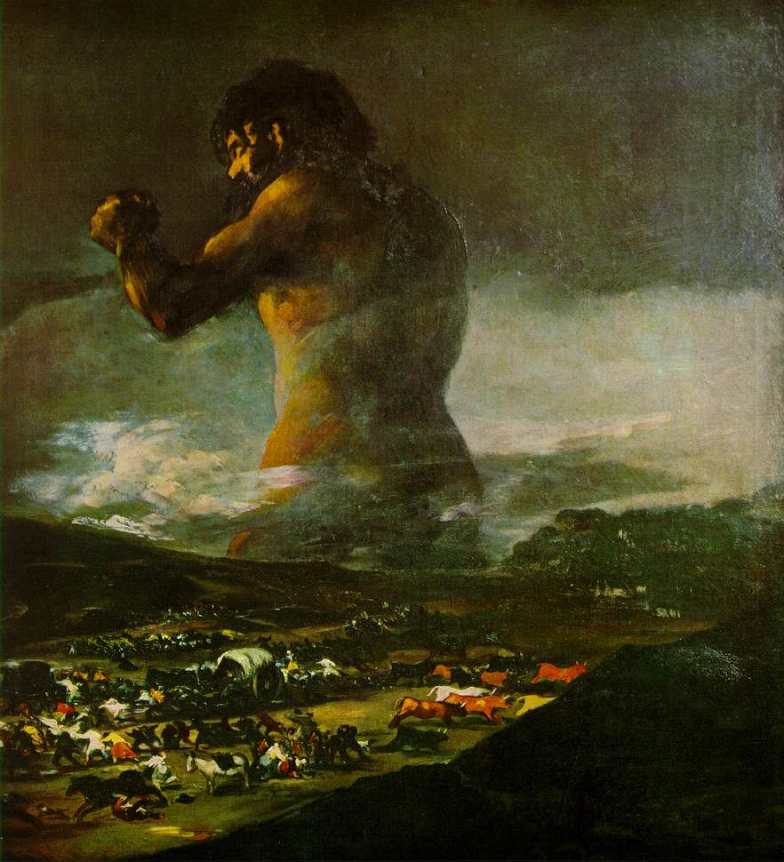 Y Colossus, 1810.